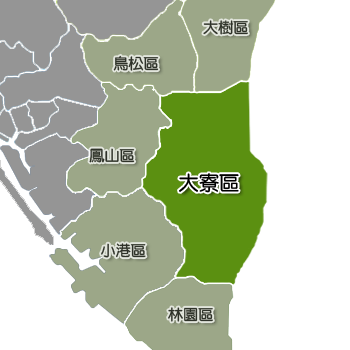 大寮區相對位置